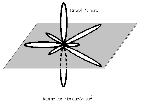 Orbitales sp2 en el carbono